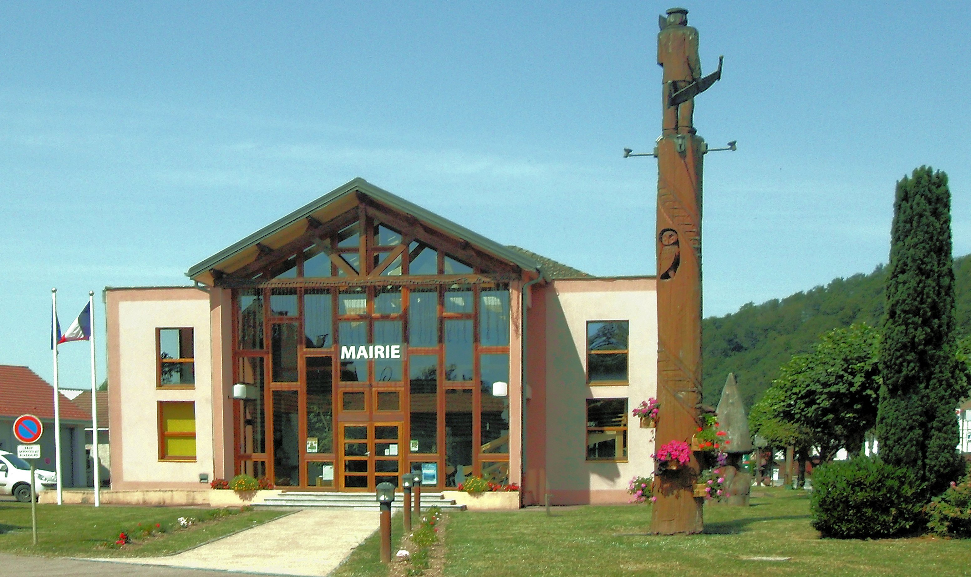 La mairie de Raddon-et-Chapendu